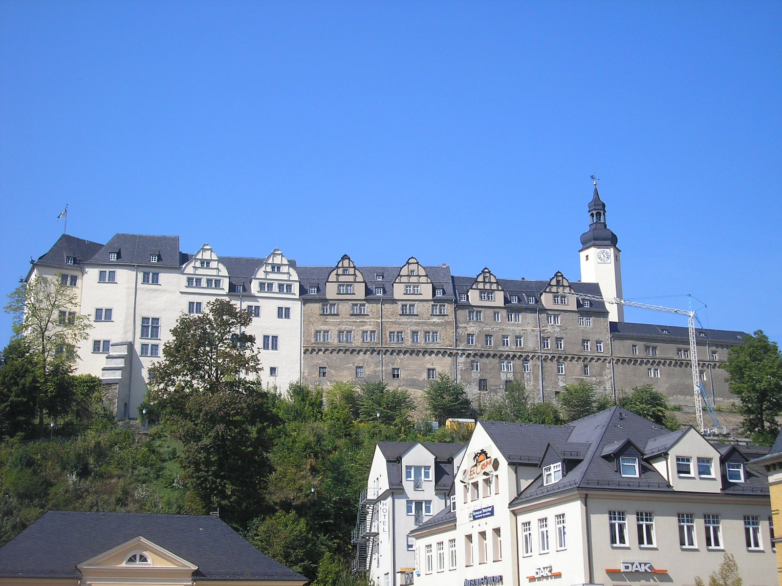 Das Obere Schloss in Greiz (Thüringen).